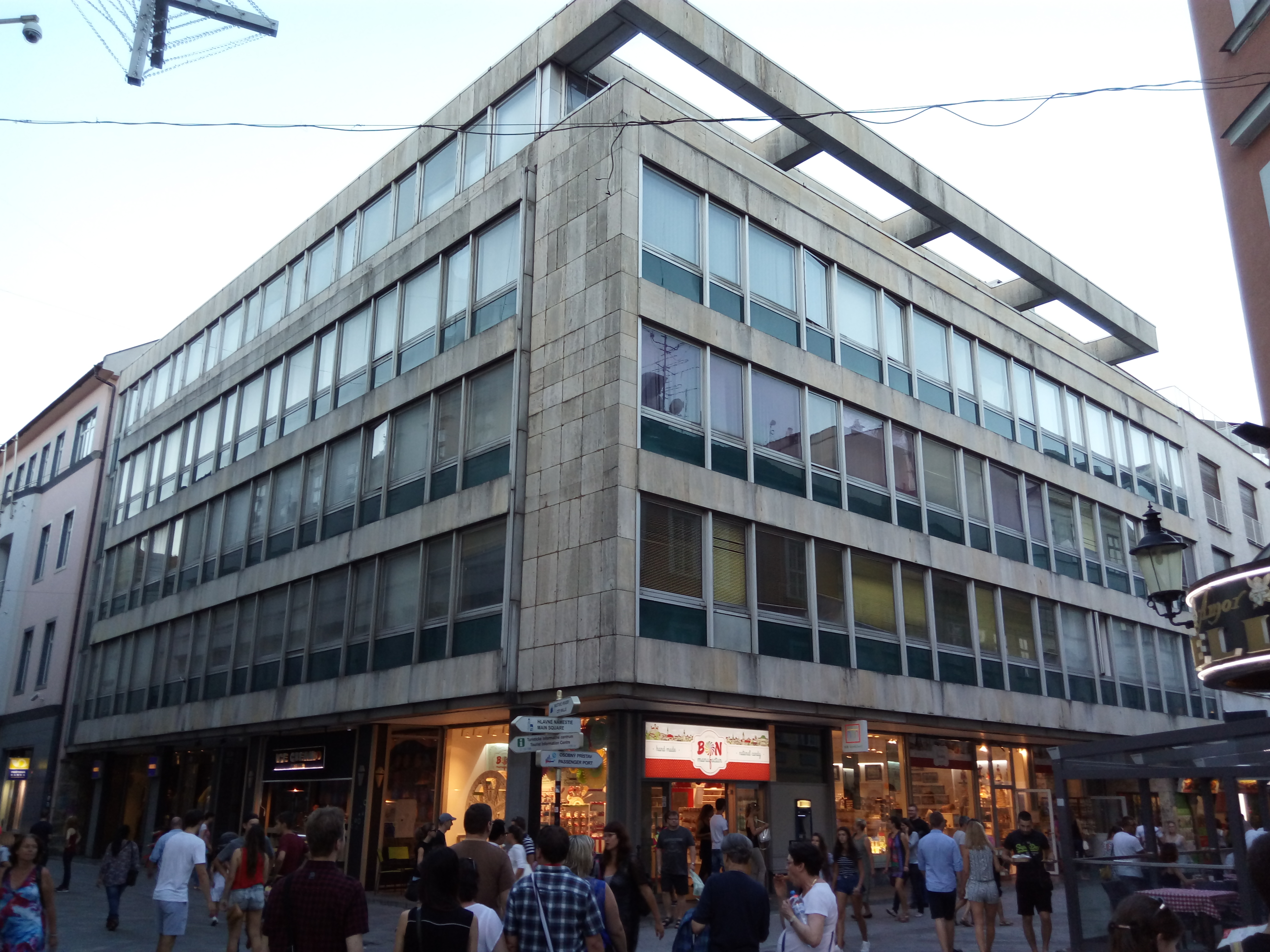 Laurinská 2, Staré Mesto, Bratislava